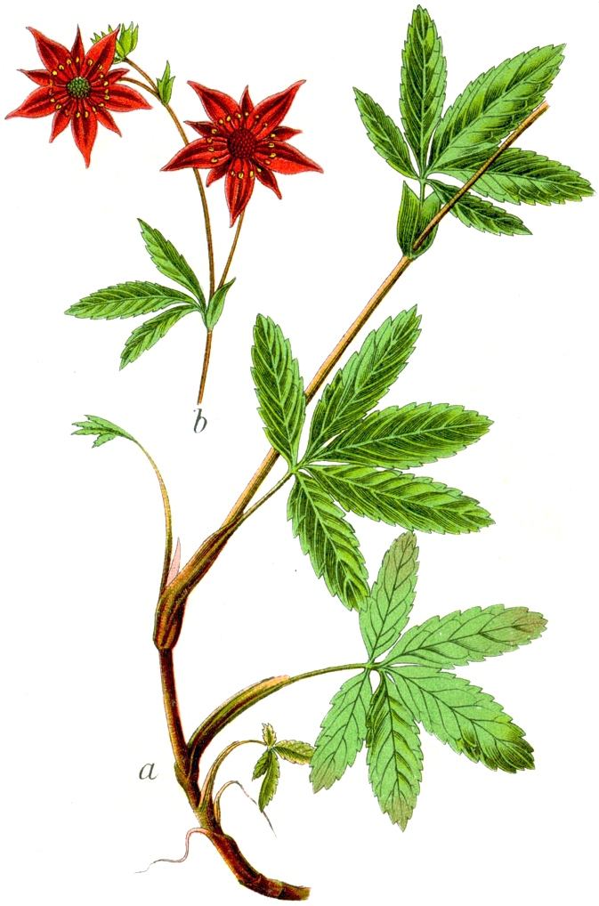 Comarum palustre L., syn. Potentilla palustris (L.) Scop., Potentilla comarum Nestl. Original Caption Blutauge, Potentilla comarum